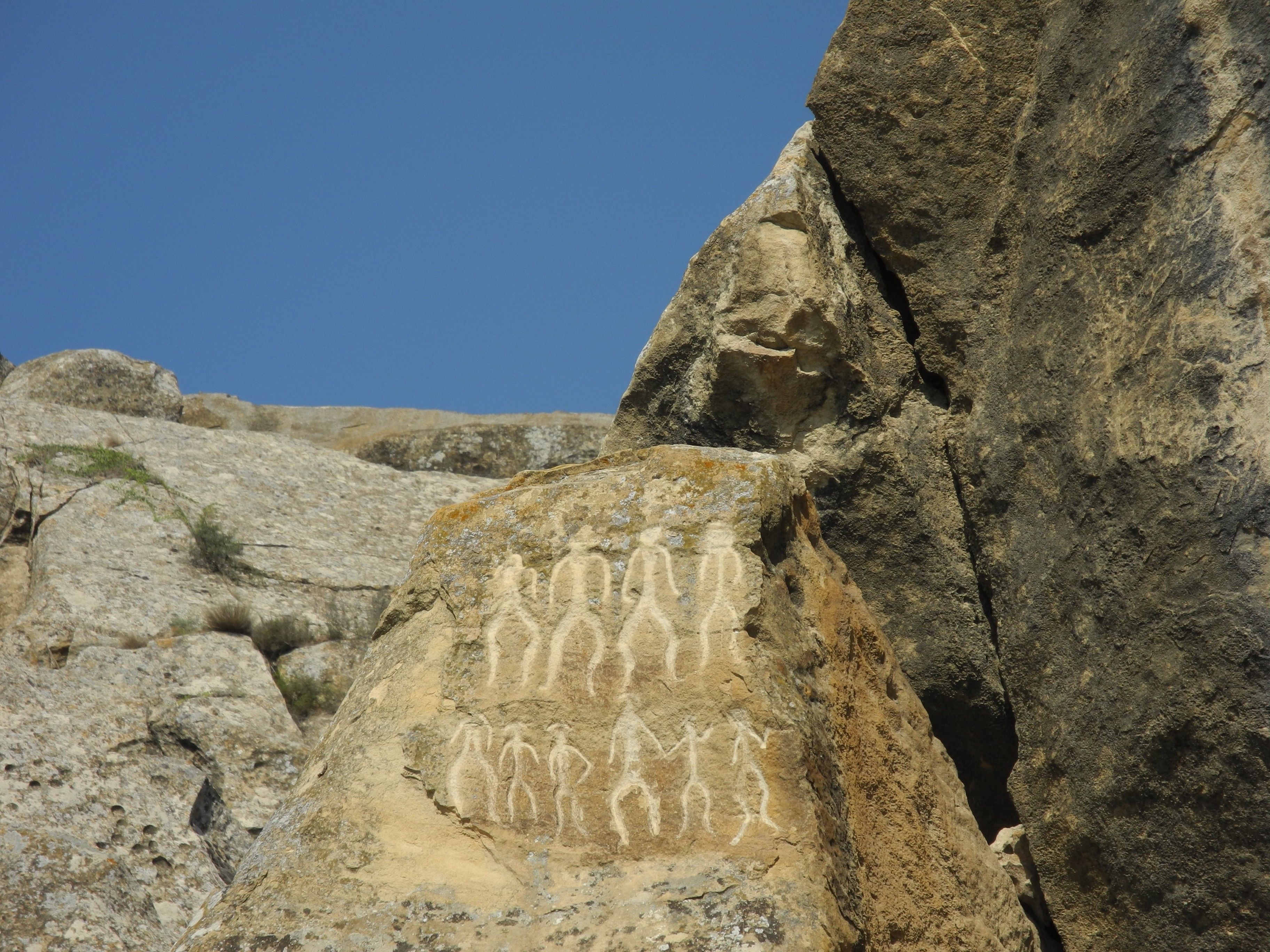 Baku_Felslandschaft_mit_4000_Jahr_alten_Gravuren.JPG